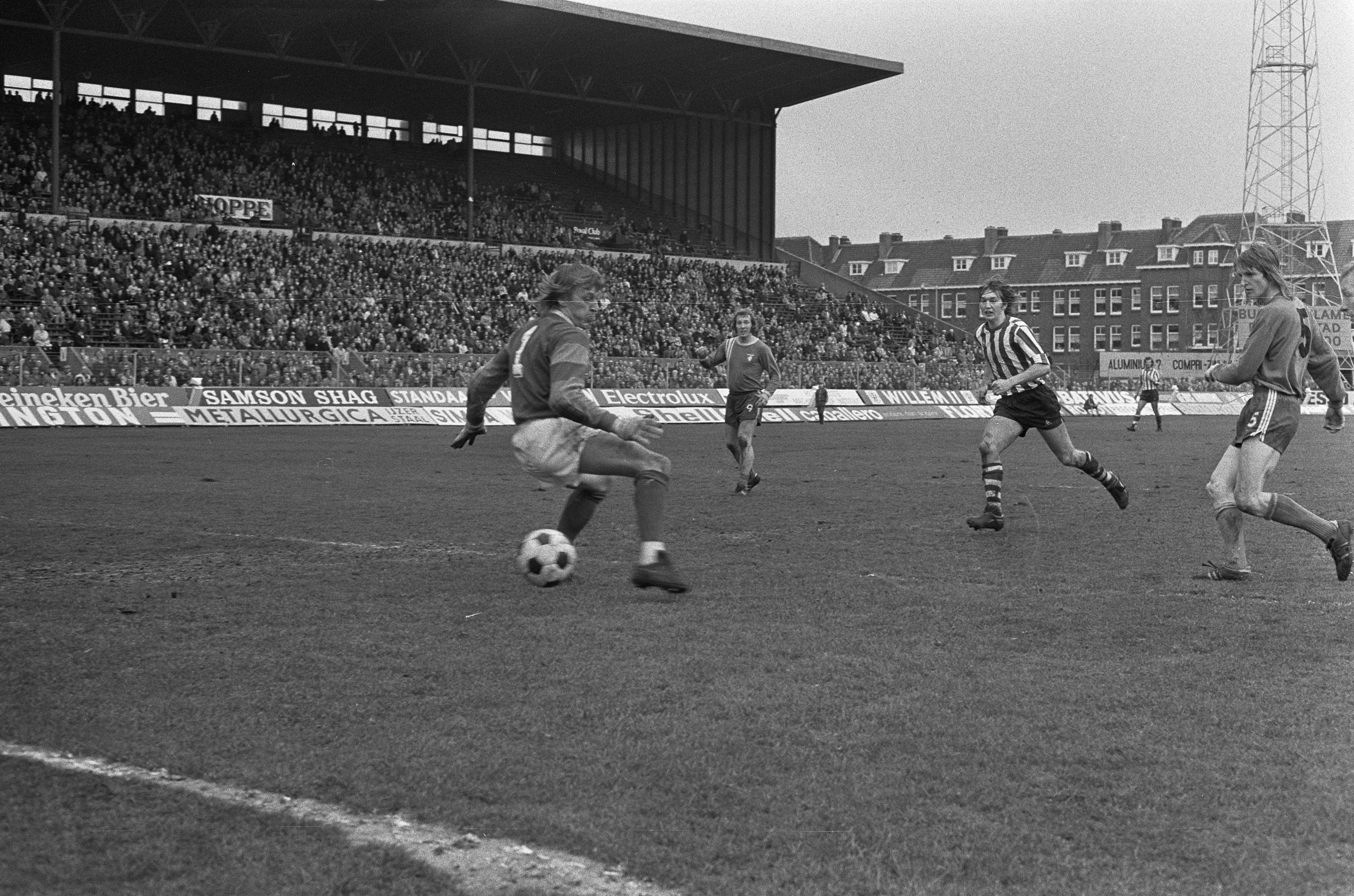 Match de football Sparta - Twente (1-2) à Rotterdam, Frans Thijssen (à droite, n°5) marque (0-2) ; à gauche le gardien de but Pim Doesburg. Photographie par Hans Peters / Anefo.